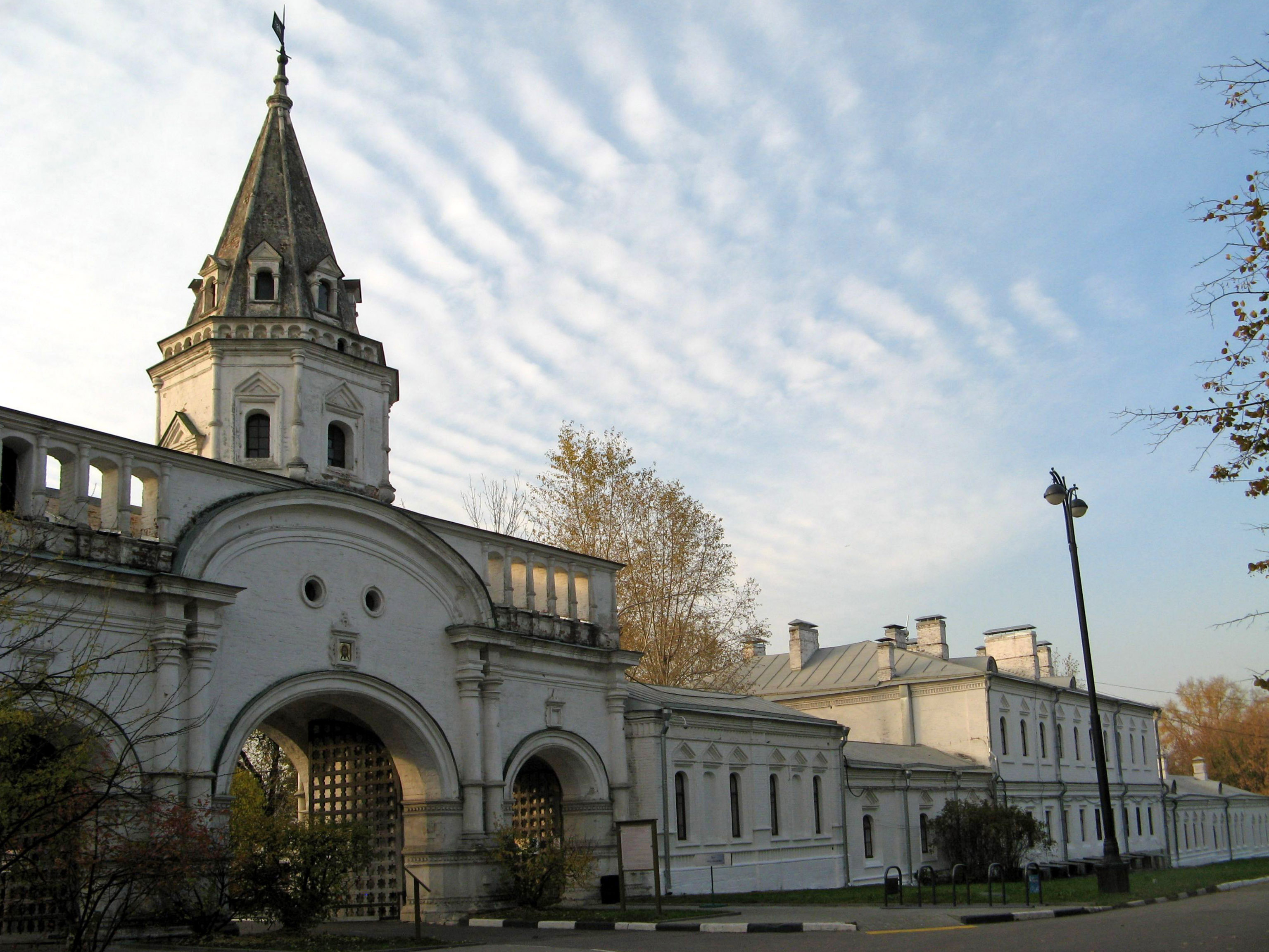 Передние ворота дворца Алексея Михайловича, восточные: городок им. Баумана, нет адреса БТИ, Измайлово, Восточный округ, Москва